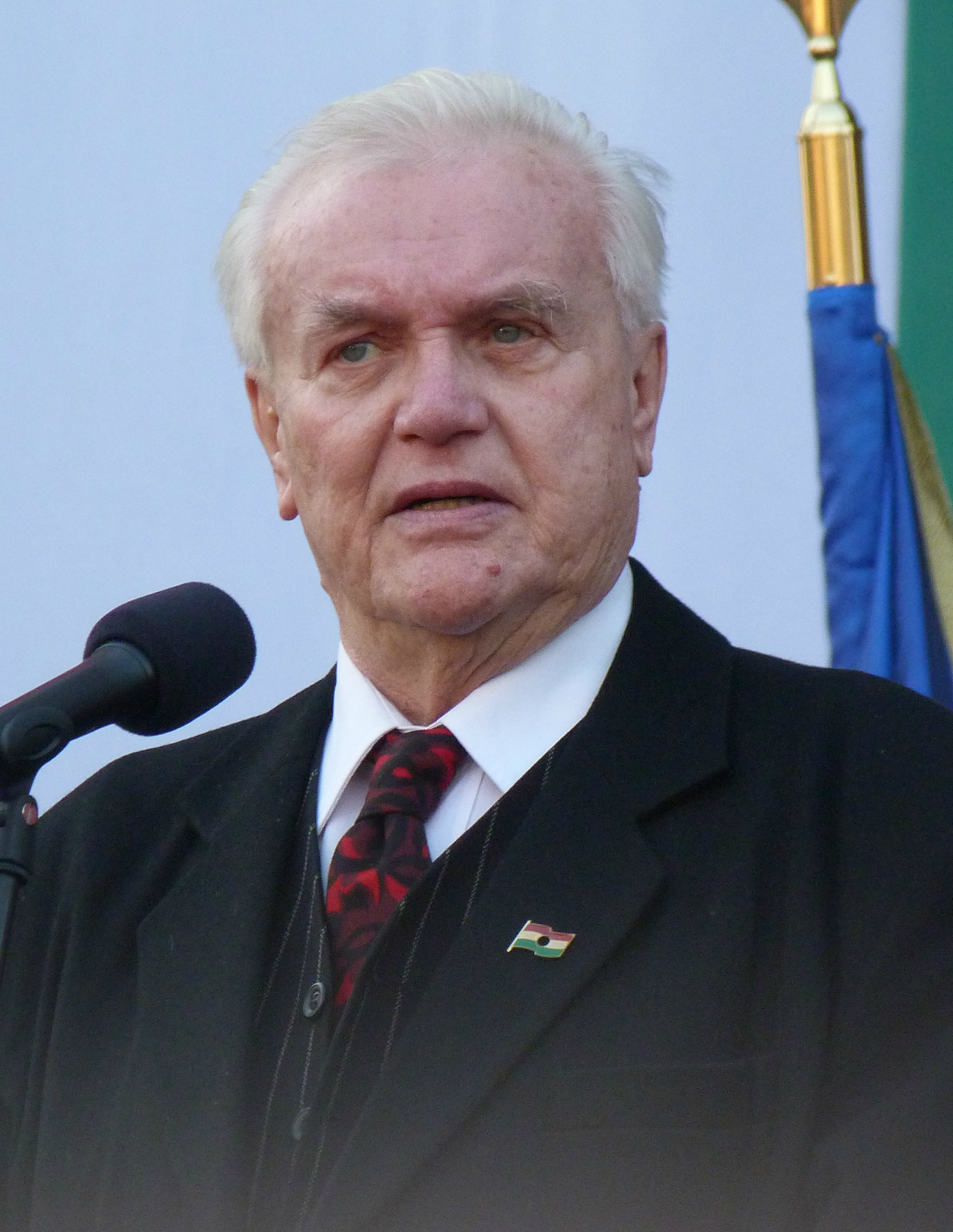 Csurka László magyar színész.